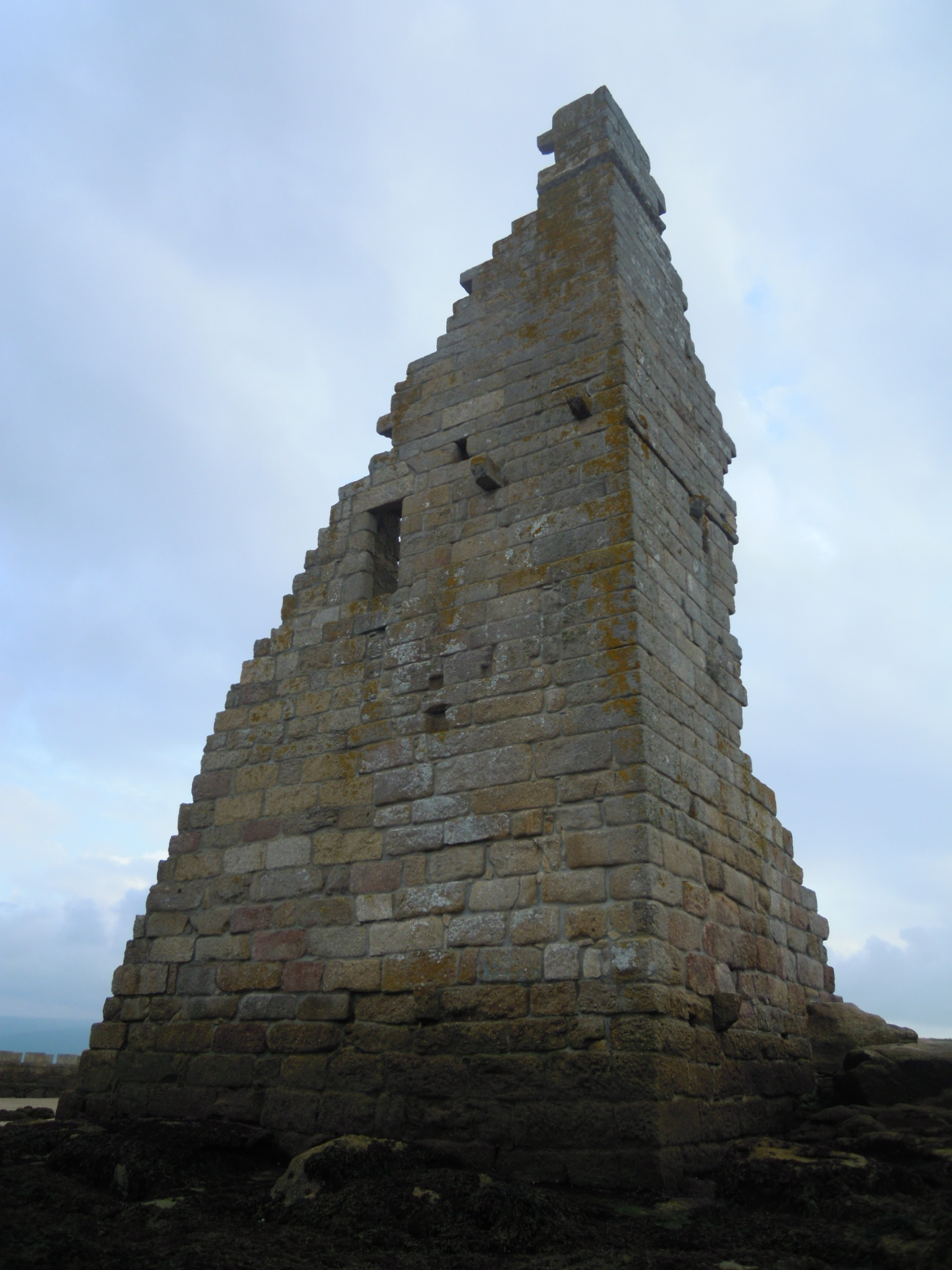 Vista exterior da Torre de San Sadurniño (Cambados).